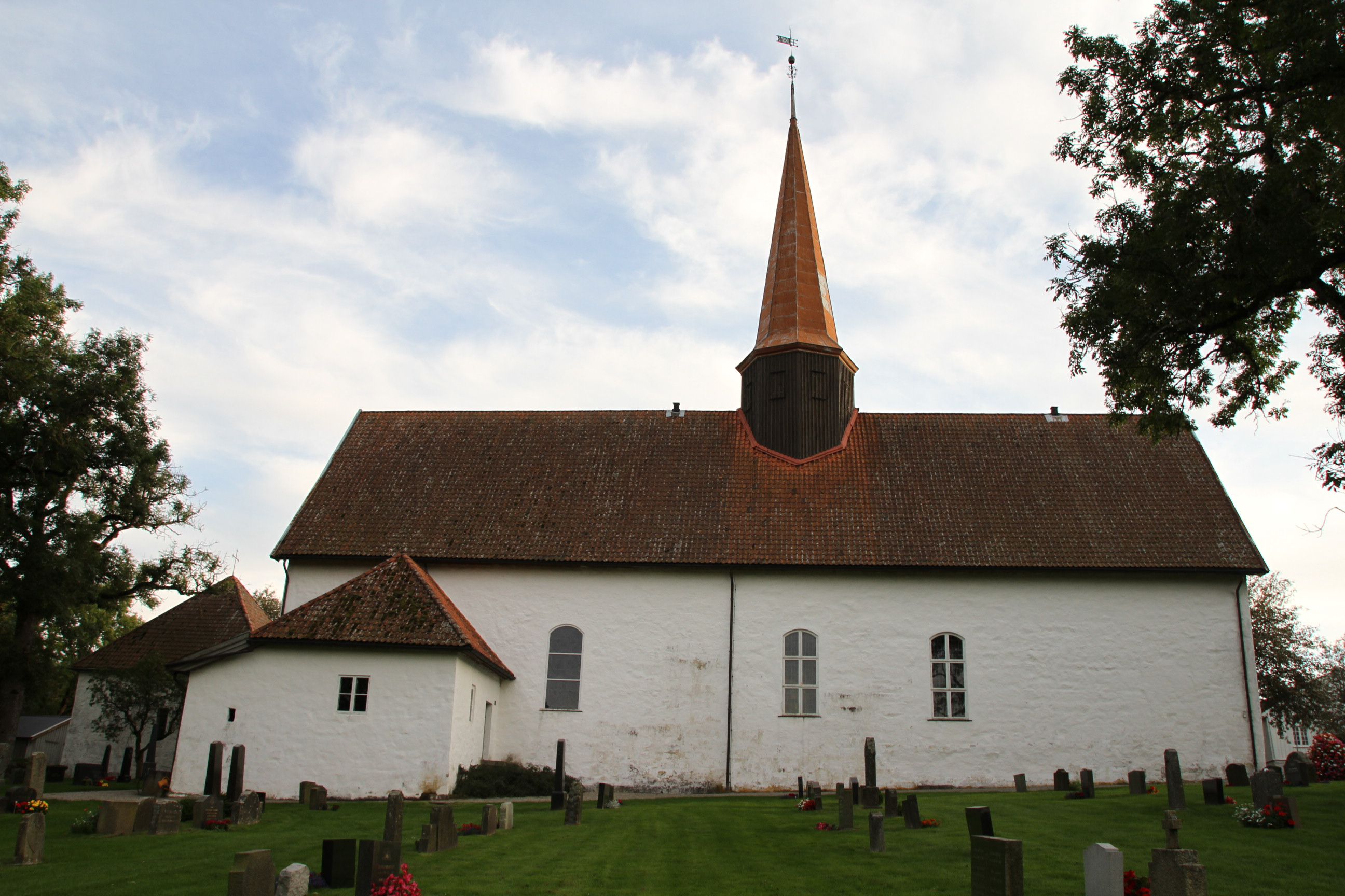 Skjeberg middelalderkirke, i Sarpsborg kommune